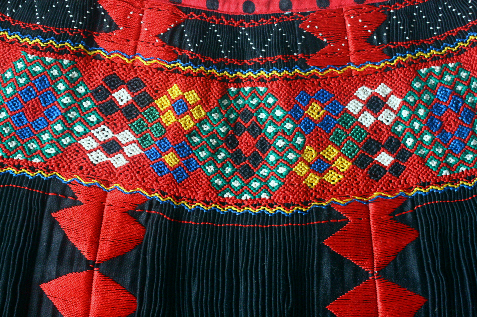 Kalotaszegi román kötény (musuie) ráncolása (Erdély)